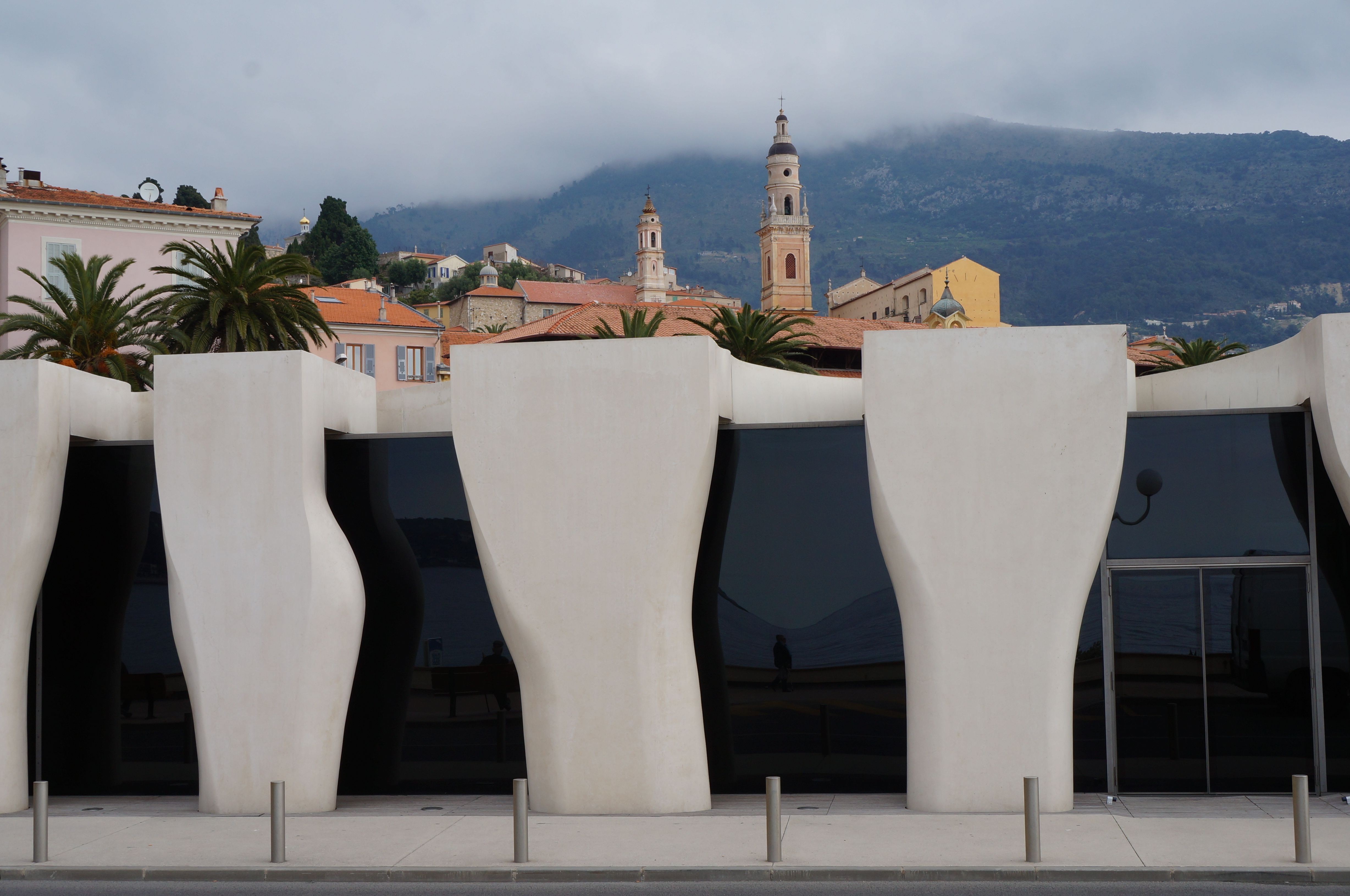 Musée Jean Cocteau / Museum Jean Cocteau